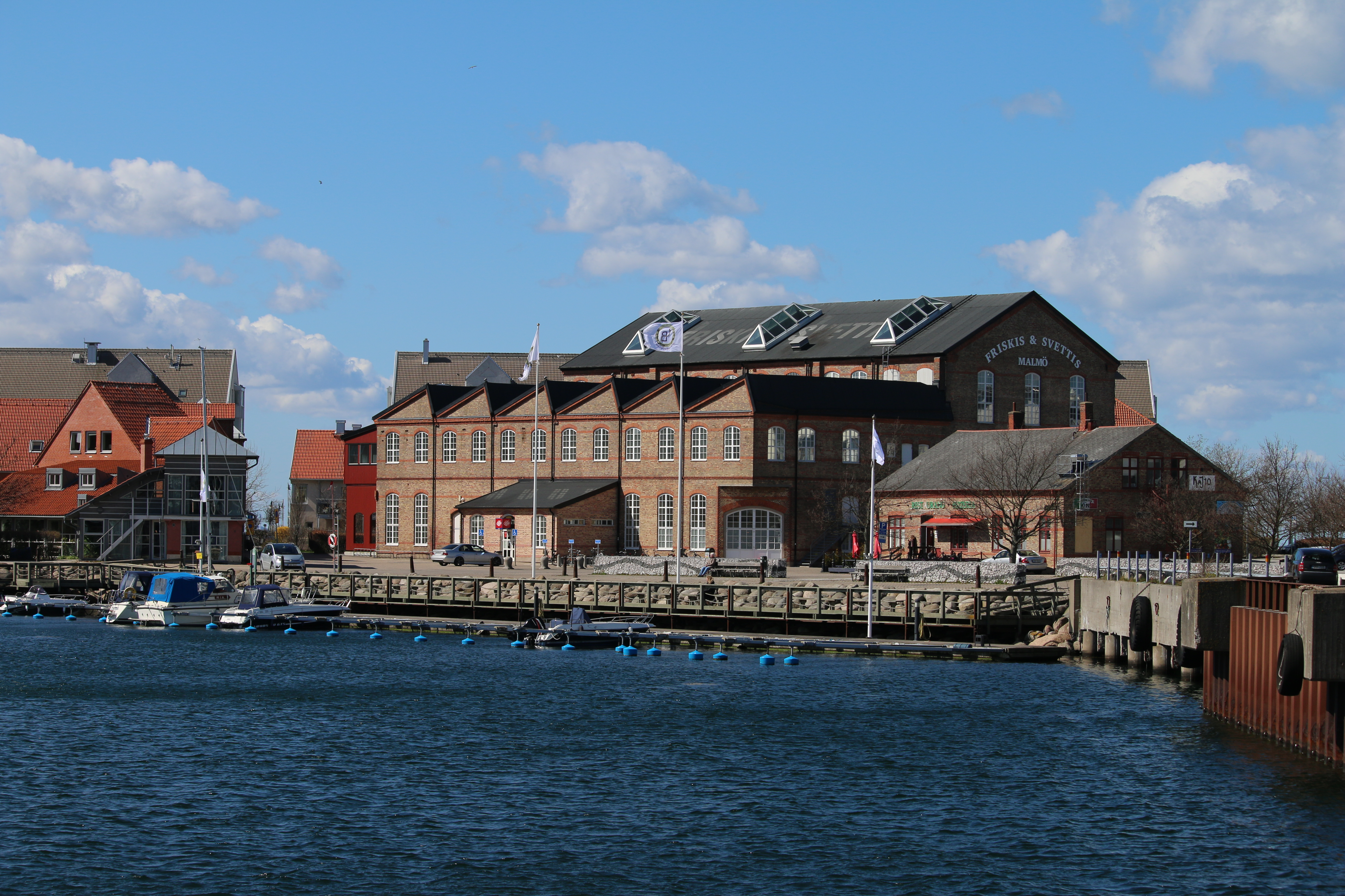 Limhamn, Ön, Södra ostsidan